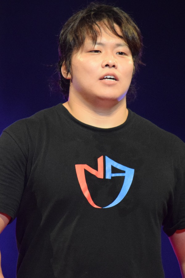 2018年7月29日 大阪府立体育会館 「2018 SUMMER ACTION SERIES」 諏訪魔